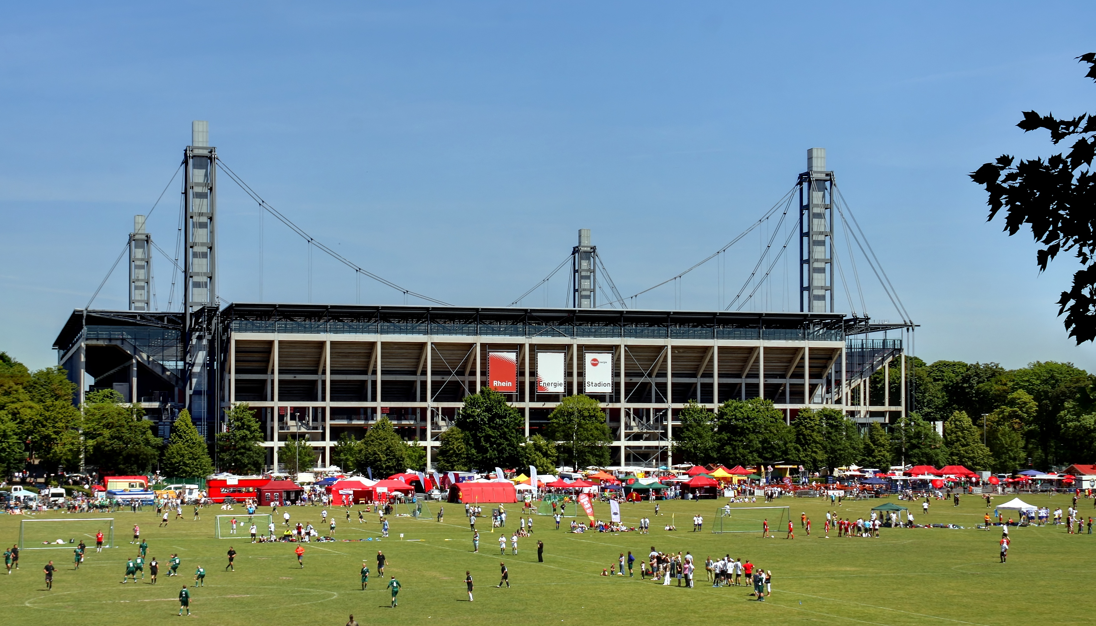 Rheinenergie-Stadion, Südseite. Im Vordergrund Fußballspieler auf der Jahnwiese im Rahmen des „Come-Together-Cup“ 2011.